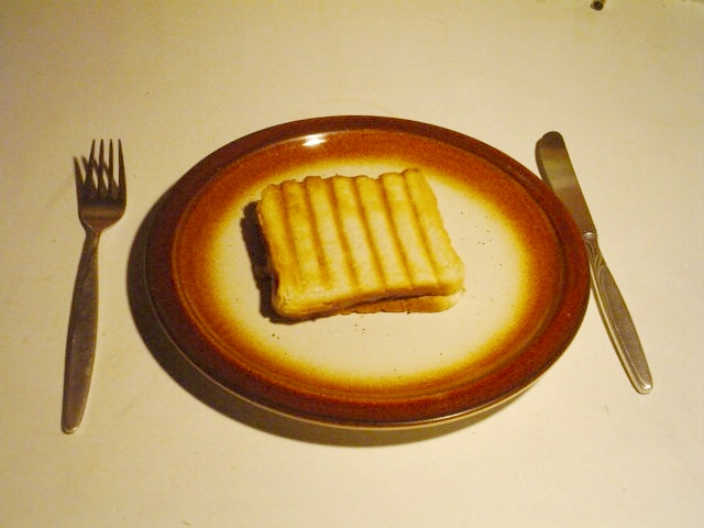 Un croque monsieur simple - 2 pains de mie grillés avec au milieu une tranche de jambon et une tranche de fromage